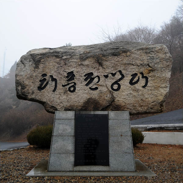 태풍전망대 이정표